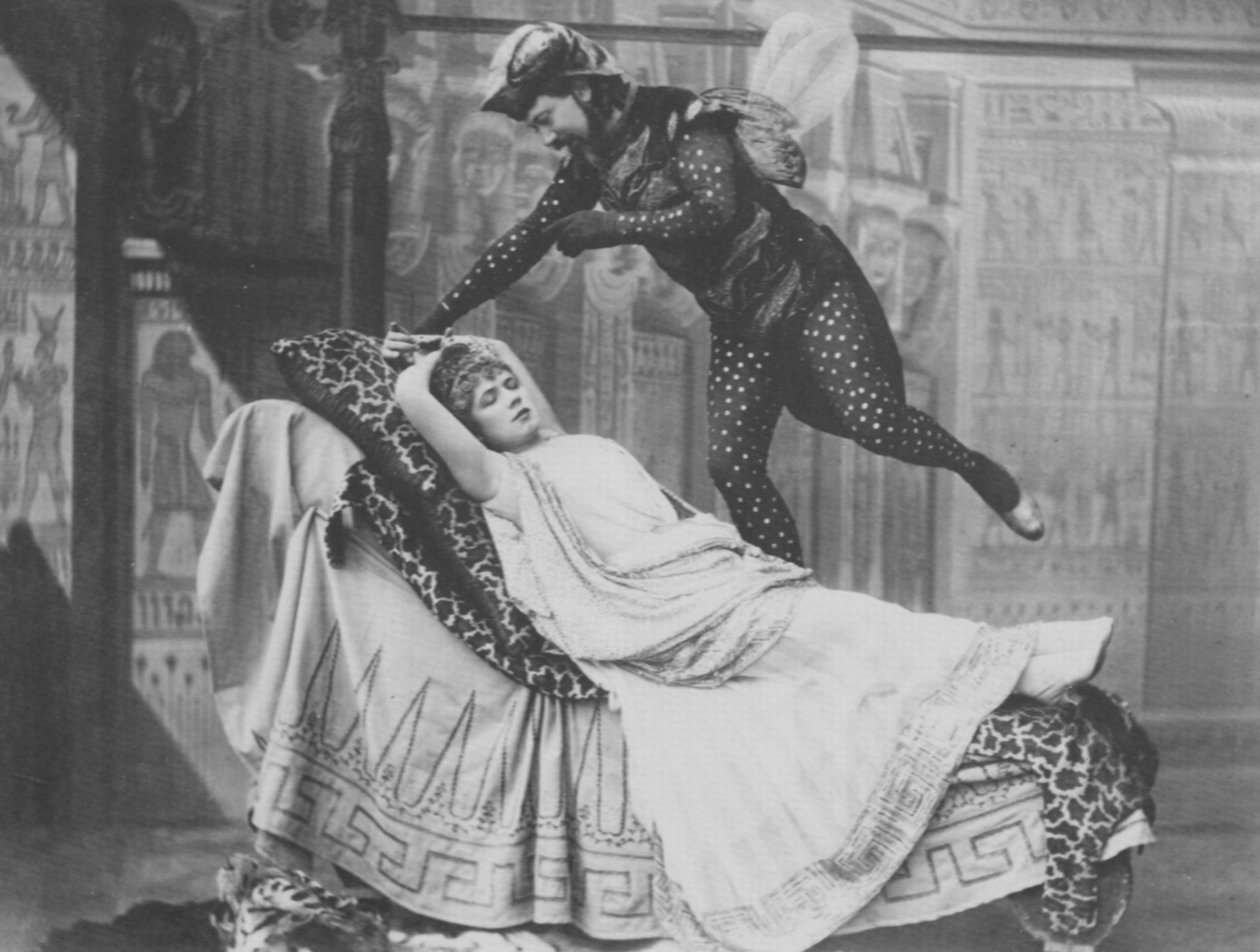 Atelier Nadar: Jeanne Granier und Vauthier in Offenbachs Operette »Orpheus in der Unterwelt«